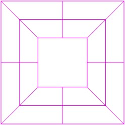 删棋棋盘 绘制人:zhuwq 绘制时间:2005年3月25日